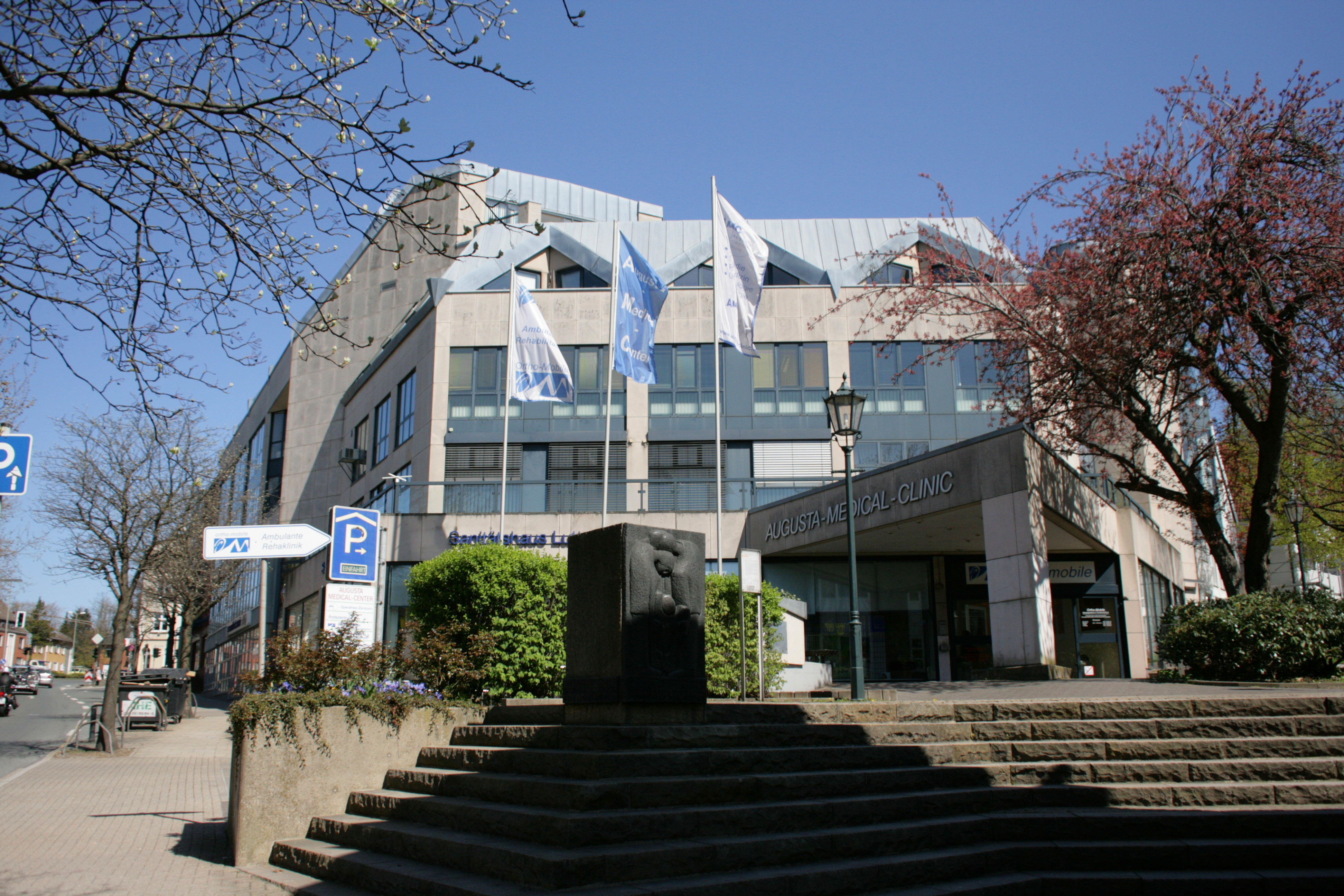 Synagogenplatz an der August-Bebel-Straße in Hattingen; vorne der Gedenkstein „Gegen das Vergessen“ der Hattinger Bildhauerin Ulla H'loch-Wiedey (1987 zur Erinnerung an die zerstörte Synagoge Hattingen aufgestellt)